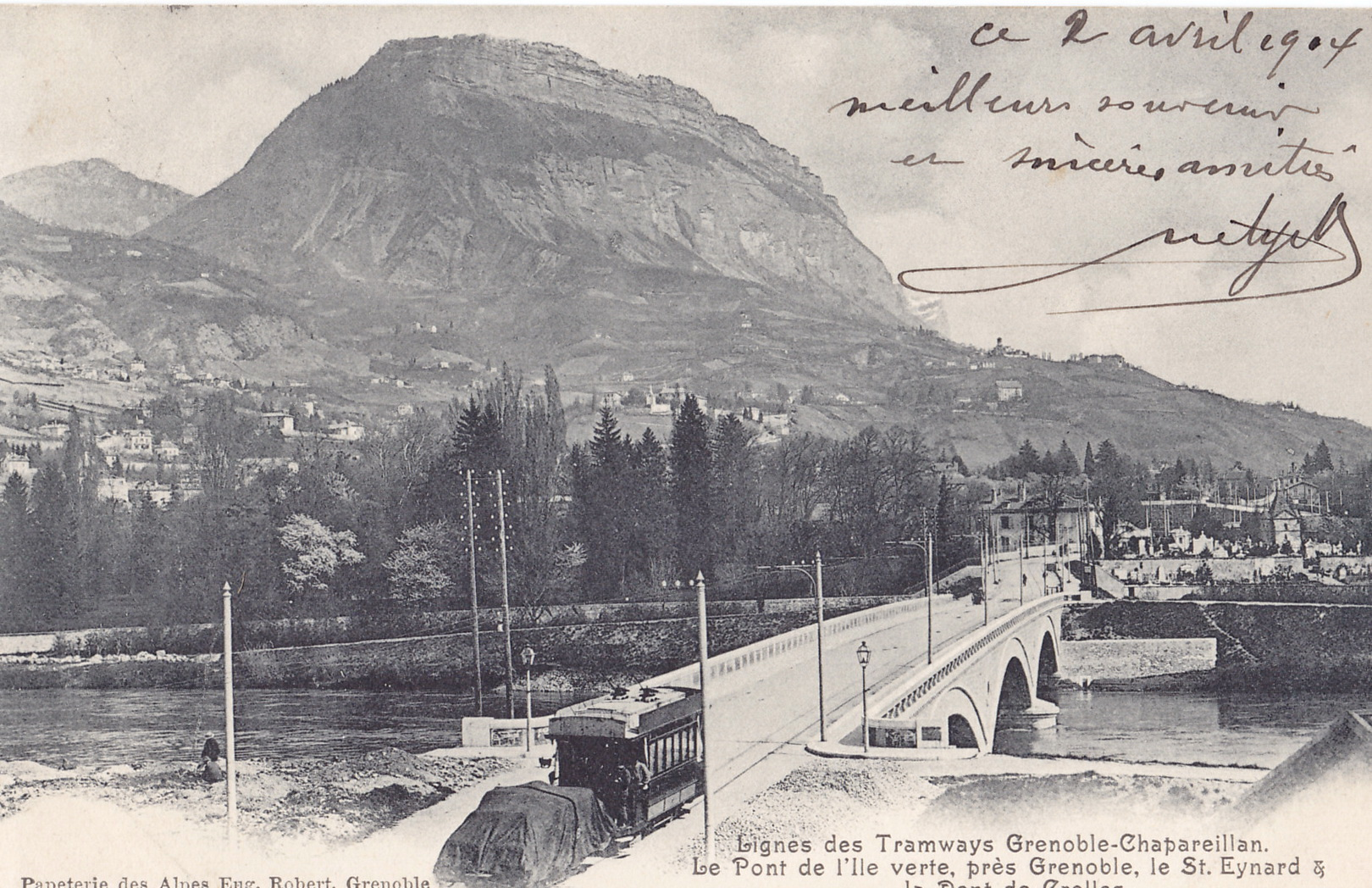 Carte postale ancienne éditée par la Papèterie des Alpes - Eug. Robert à Grenoble :Lignes des Grenoble - Chapareillan. Le Pont de l'Île-Verte, près Grenoble, le Saint-Eynard et la Dente de Crolles